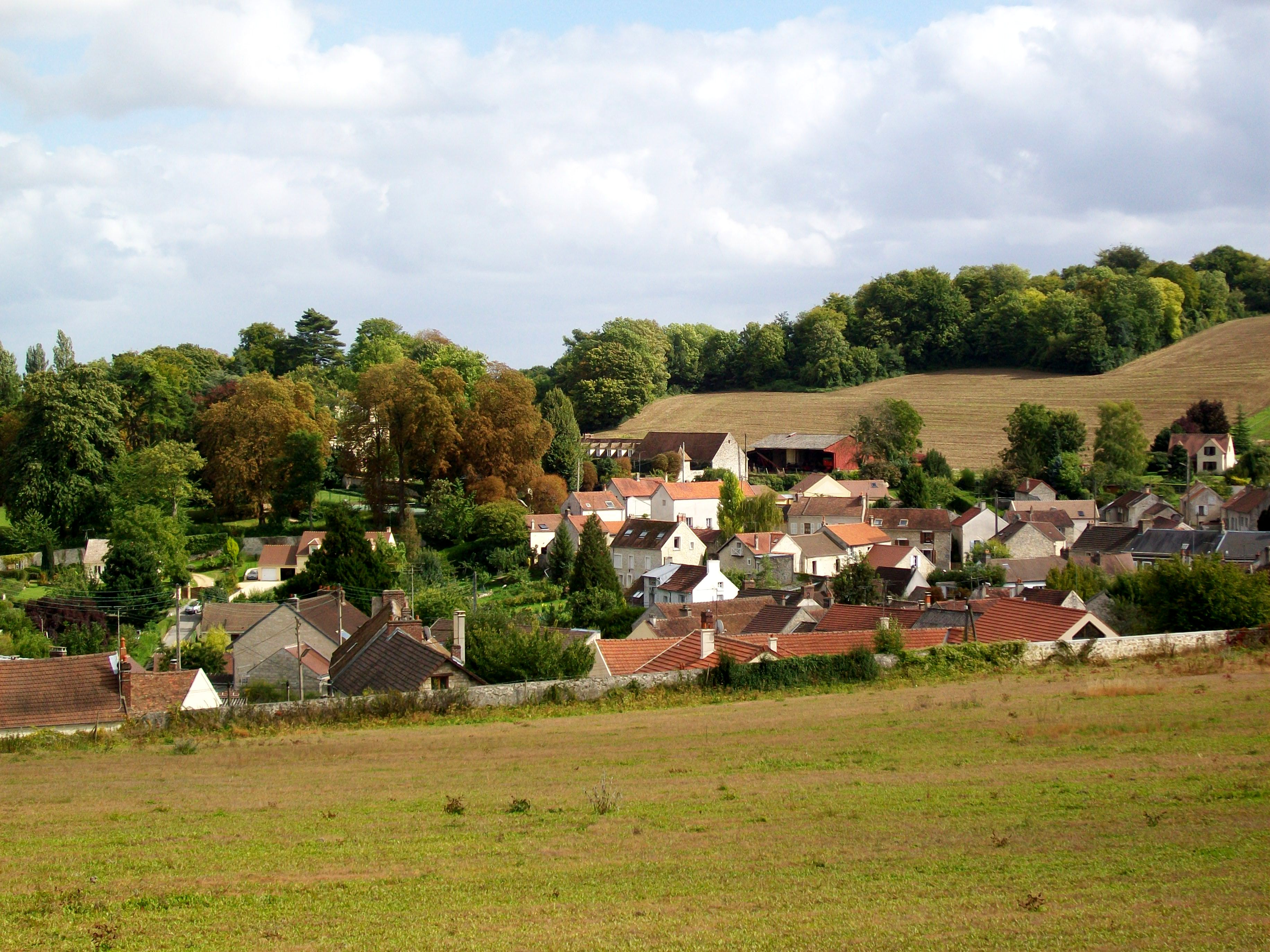 Le vieux village se blottit dans un creux du versant nord du massif de Carnelle. La déclivité entre le point culminant au carrefour de Carnelle (210 m) et le niveau de l'Oise (27) est considérable. Vue depuis la rue Pasteur.